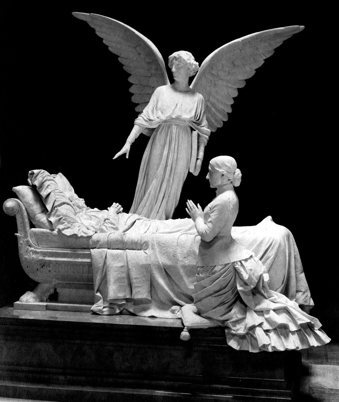 Enrico Barberi. Monumento di Raffaele Bisteghi alla Certosa di Bologna, 1885 c.a. - 1891